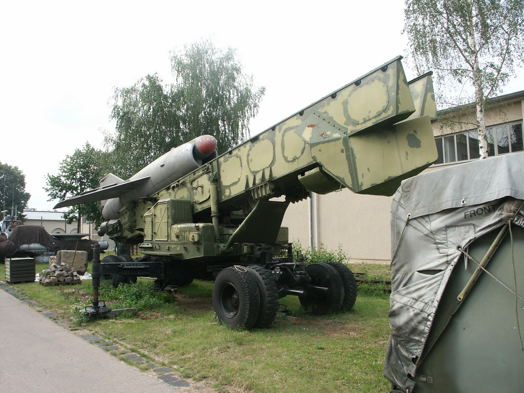 Bundeswehrmuseum Dresden mit Teilen von der NVA Anti-ship missile launcher KS-1 Sopka.